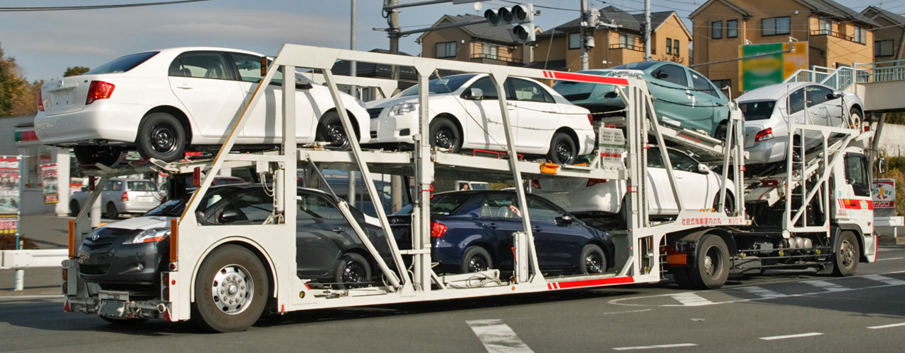 Car transporter